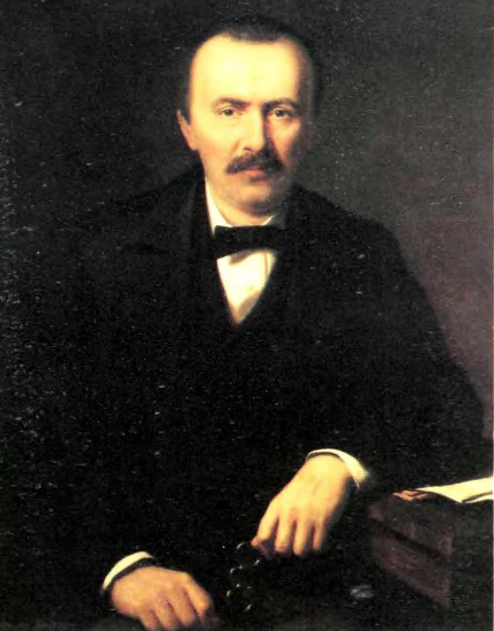 Портрет Г. Шлимана, написанный С. Ходжсом в 1877 году